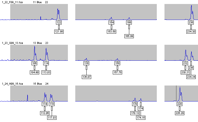 Bildschirmfoto